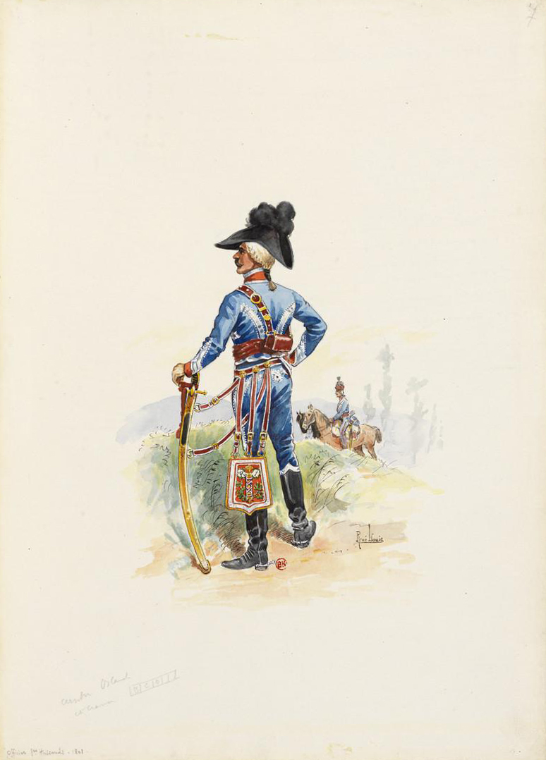 Officier du 1er Hussard en 1801